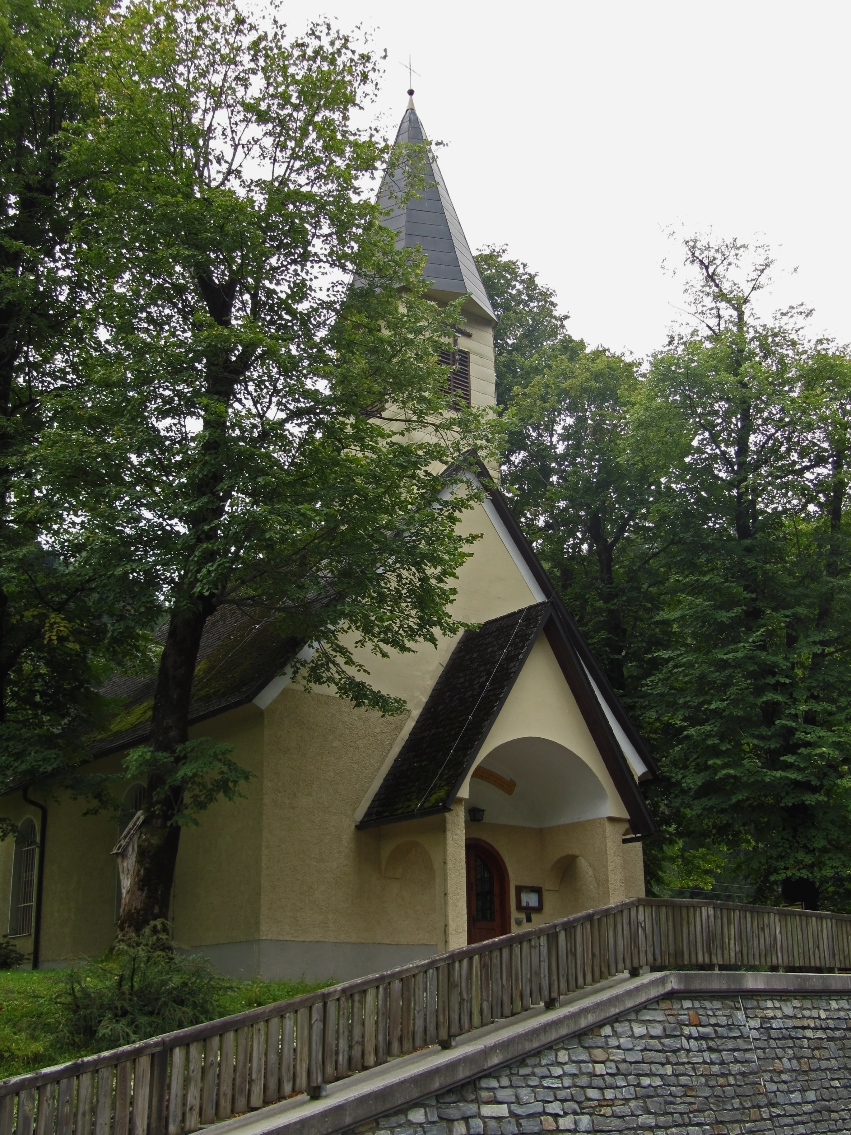 Die Wandau-Kapelle wurde 1854 erbaut, Flachtonnengewölbe mit einem Halbkreisschluss und im Westen einem Dachreiter. Der Altar folgt barocken Traditionen und die Statuen stammen aus dem 18. Jahrhundert. Die Glocke stammt aus dem Jahr 1639.